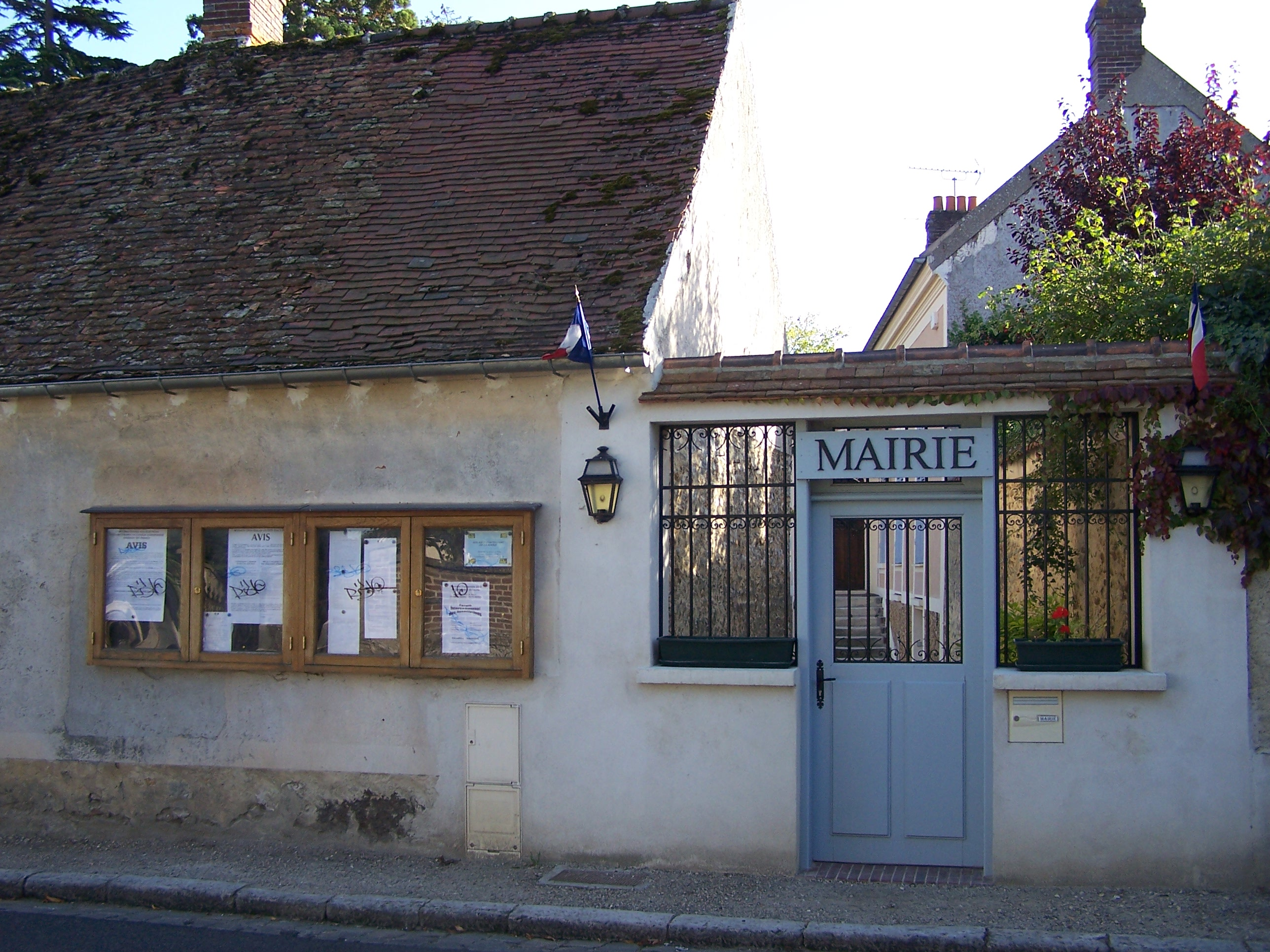 Mairie d'Auteuil (Yvelines, France)